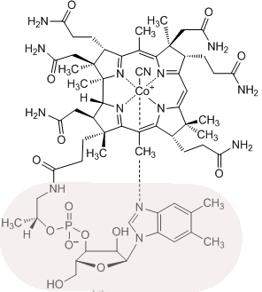 Vitamin B12 und Cobyrsäure: anstelle Nukleotid-Loop (grau unterlegt) O- und am Co ein H2O